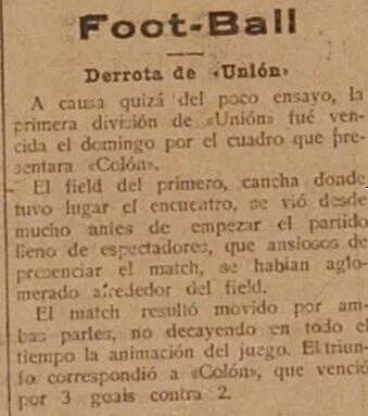 Primer clásico santafesino del que se tiene registro. Amistoso entre Unión y Colón en 1913